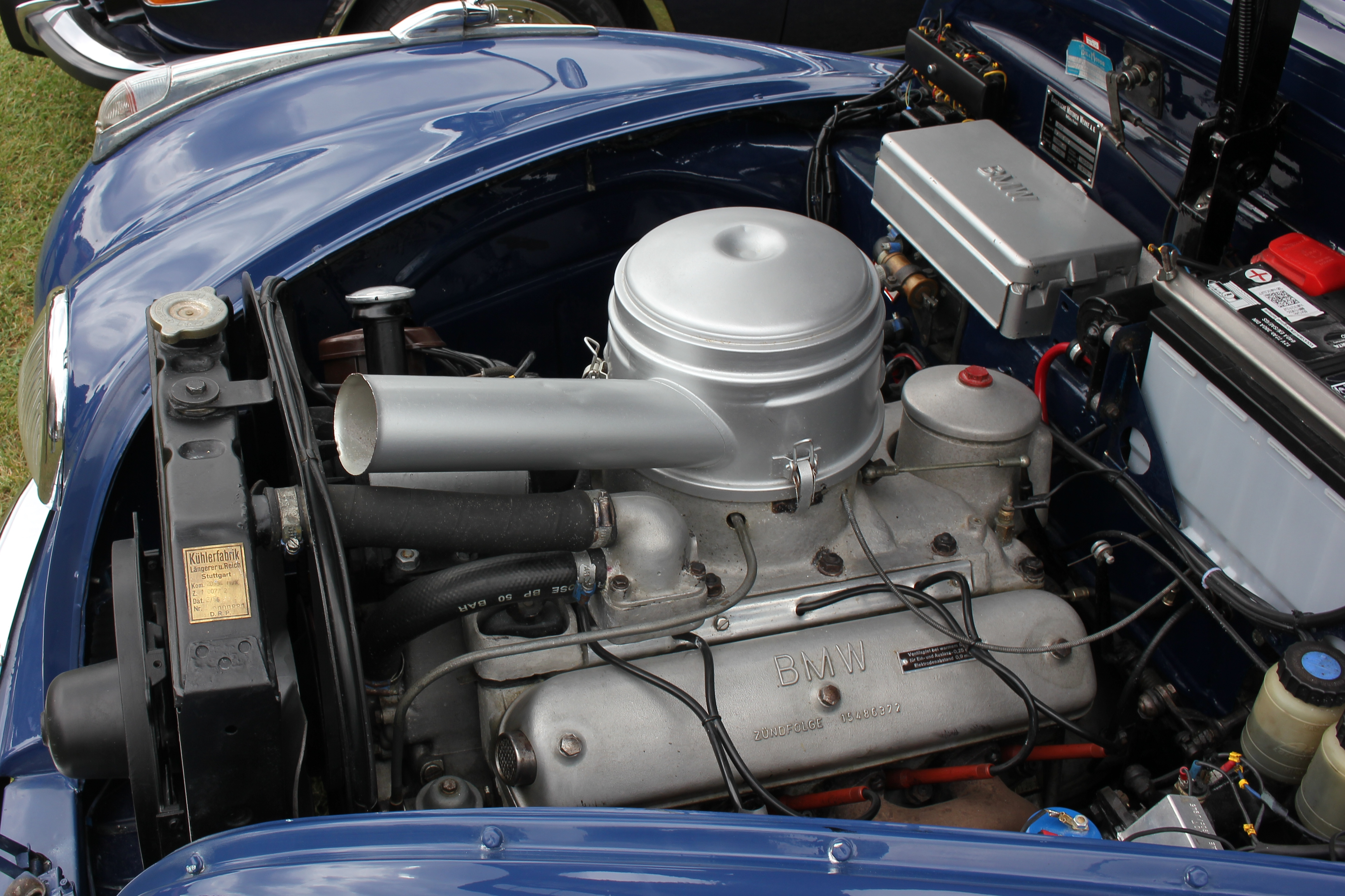 Motorraum eines BMW 502, Baujahr 1957, V8-Motor